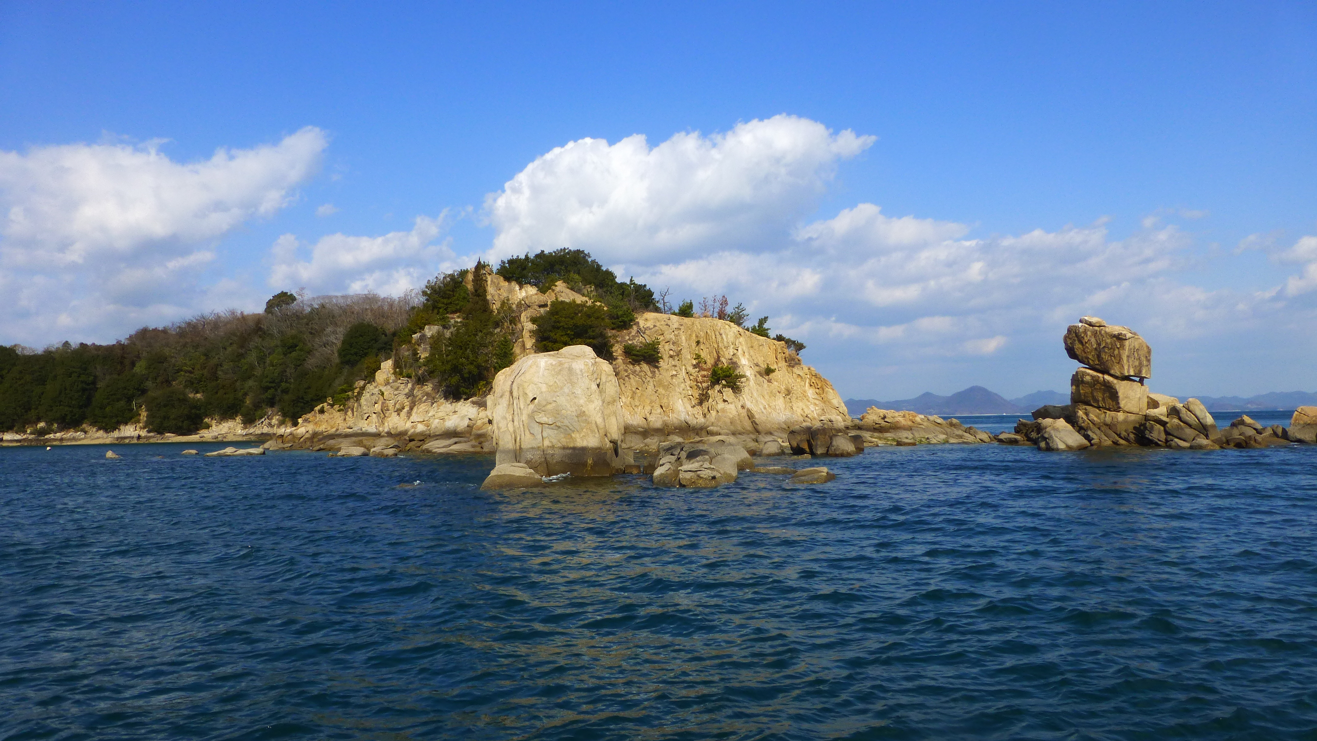 岡山県北木島のねこ岩と重ね岩